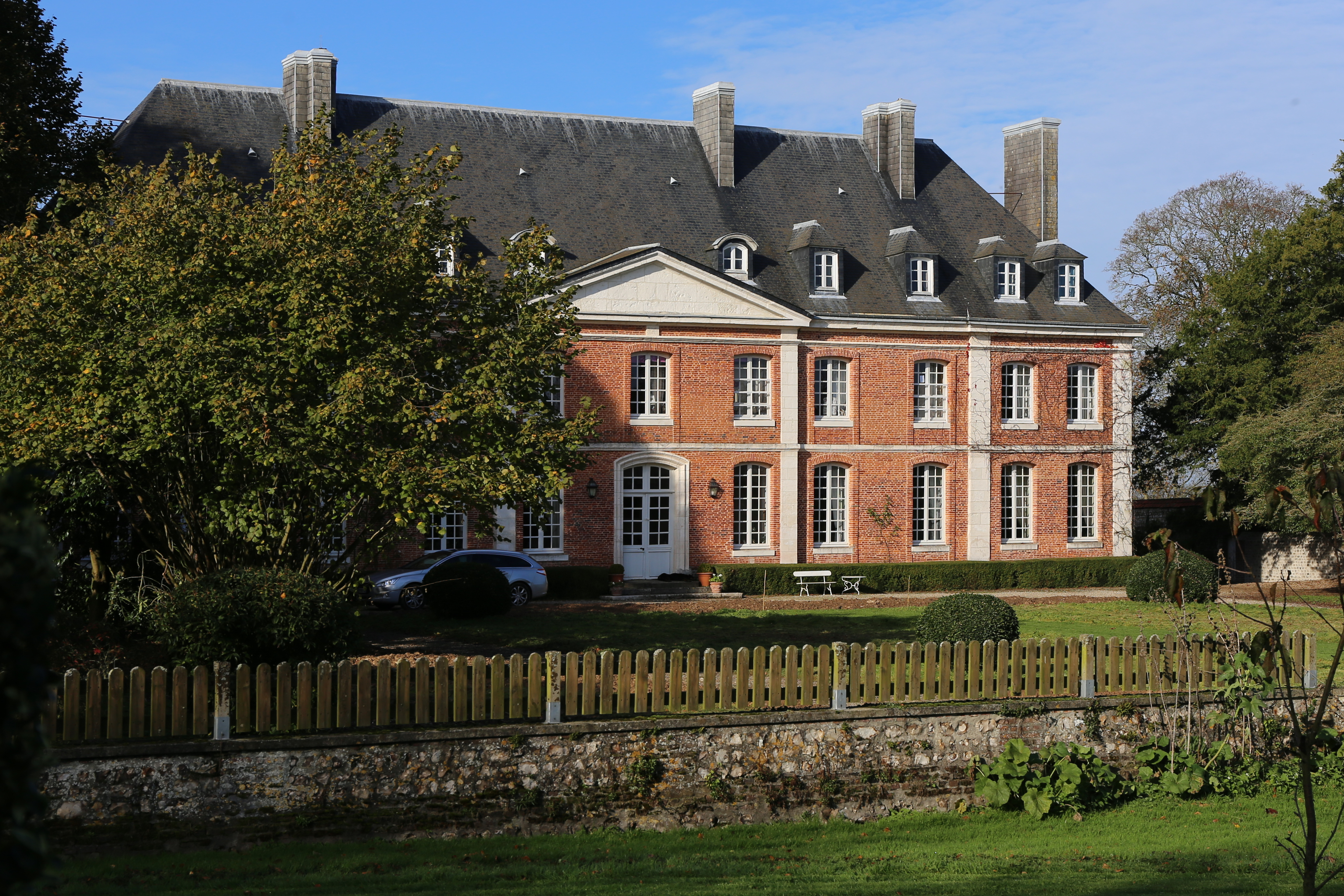 Le château de Cuverville, ancienne propriété d'André Gide.